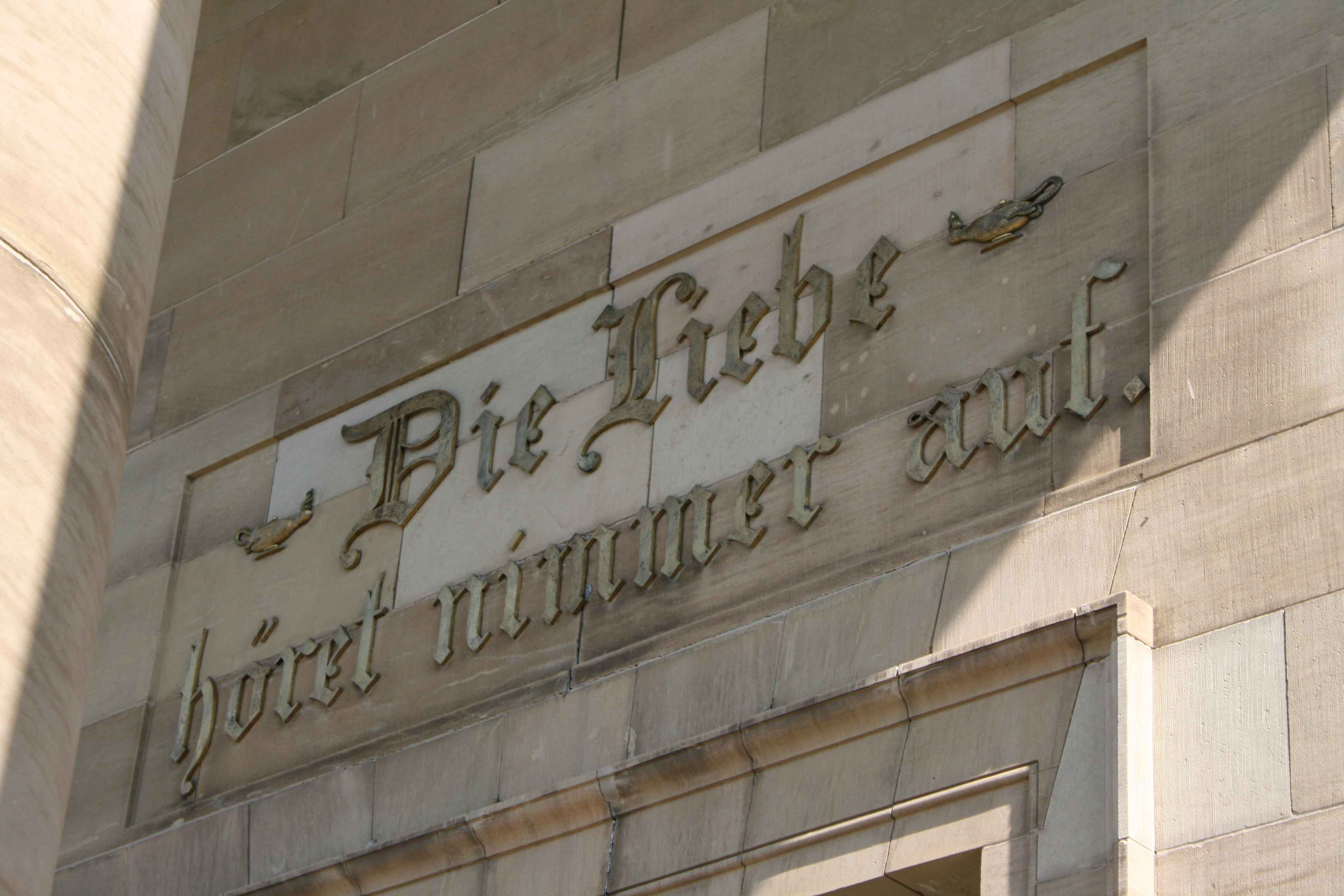 Inschrift an der Grabkapelle auf dem Württemberg (Berg) in Stuttgart-Rotenberg "Die Liebe höret nimmer auf"